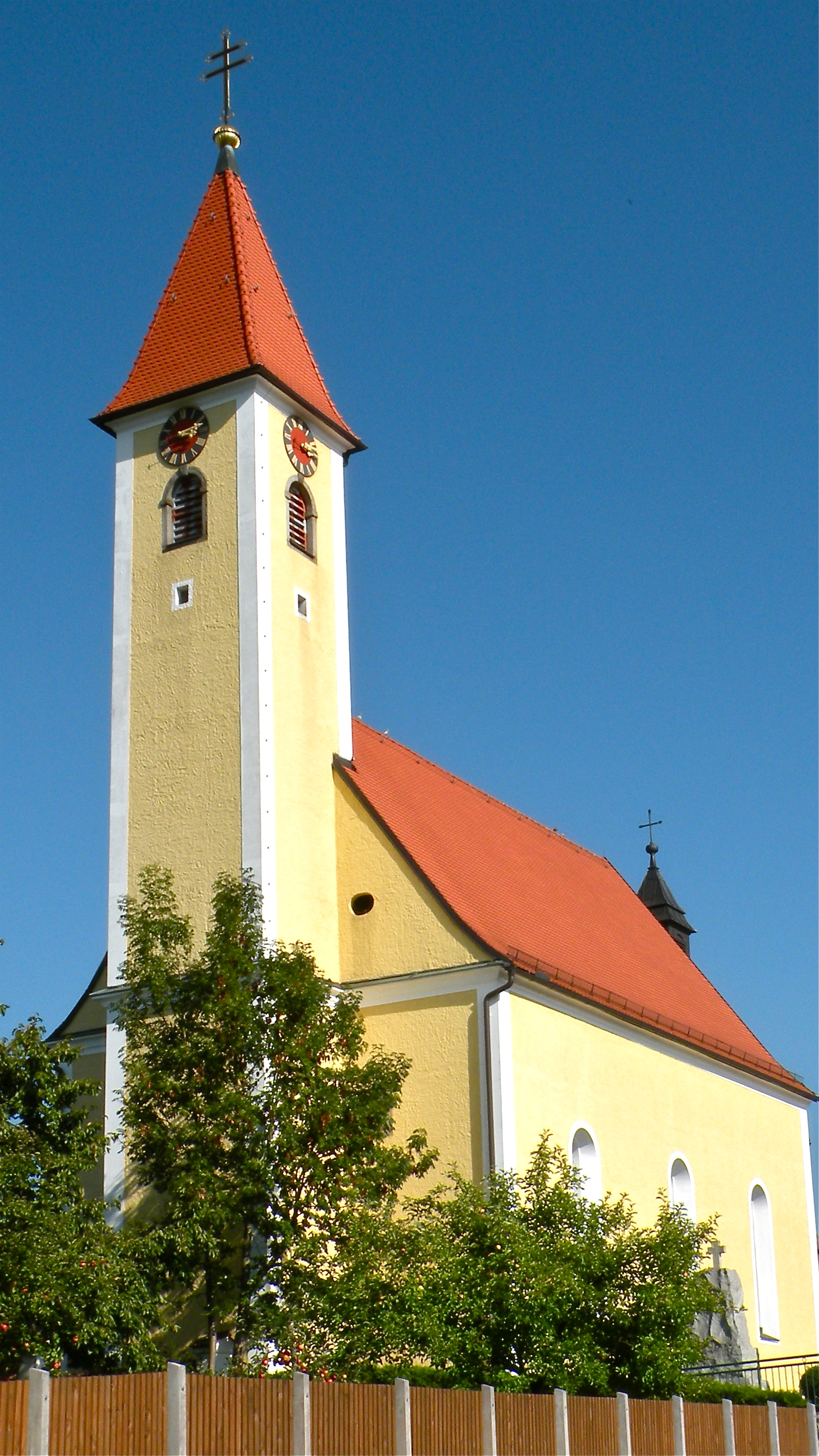 Kath. Filialkirche Hl. Vitus, Pfarrkirche Katsdorf